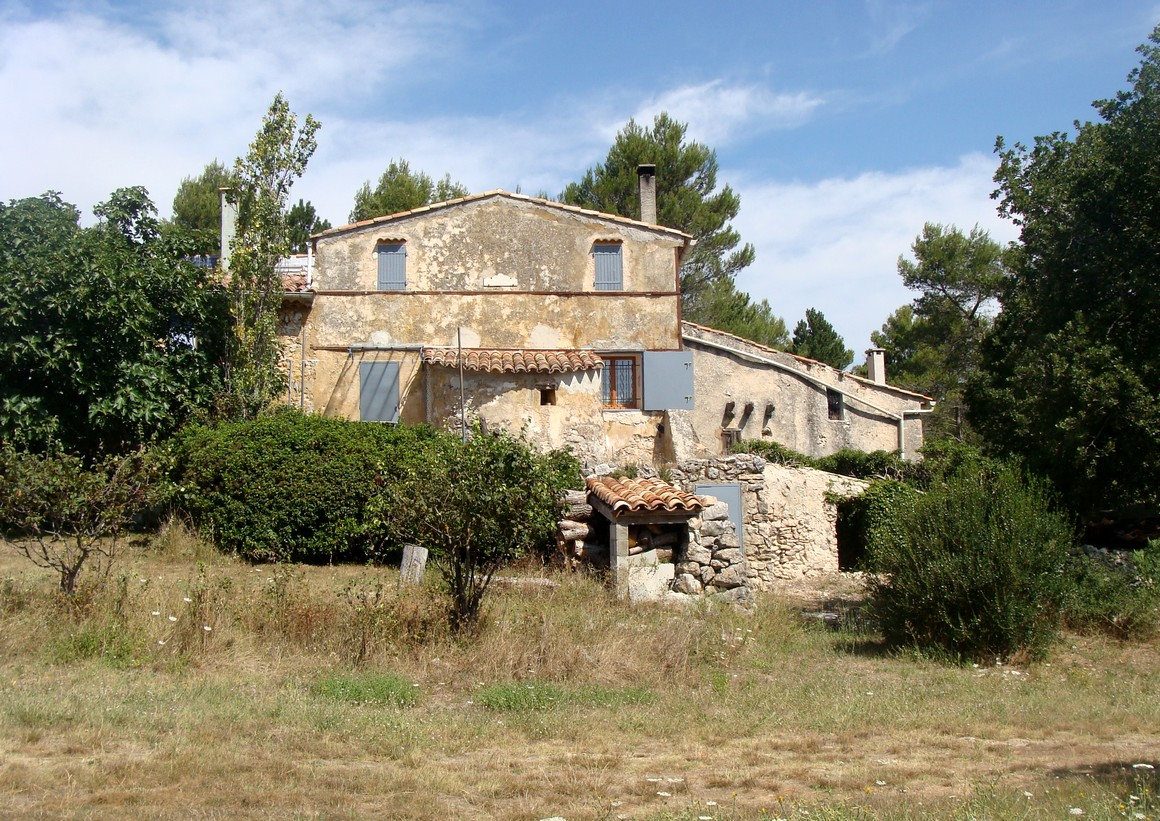 La ferme dite Châteaurenard, dans les collines au sud de la commune ; c'est la "ferme des Romarins" dans le film Jean de Florette de Claude Berri ; état en 2014 (le film est de 1986).